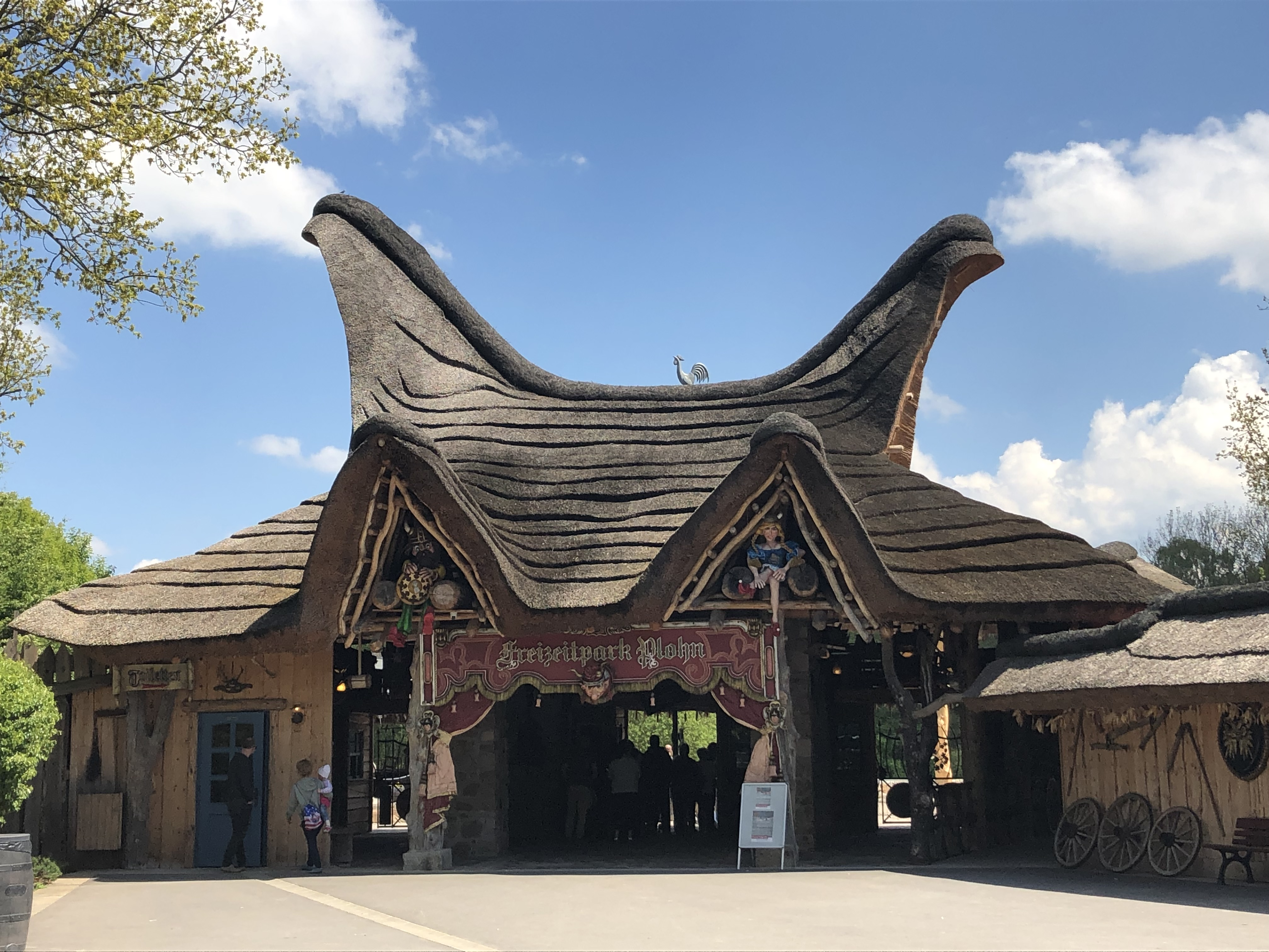 Freizeitpark Plohn, Eingangsbereich (2019)